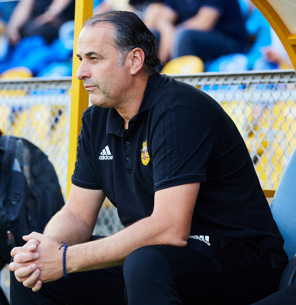 «Ростов» - «Арсенал»